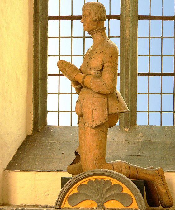 Herzog Franz von Braunschweig-Lüneburg, Holzplastik auf seinem Sarkophag in der Schlosskapelle Gifhorn, Erlaubnis des Heimatmuseums Gifhorn zur Abbildung liegt vor. Foto aufgenommen von Benutzer Benutzer:Axel Hindemith, Juni 2005